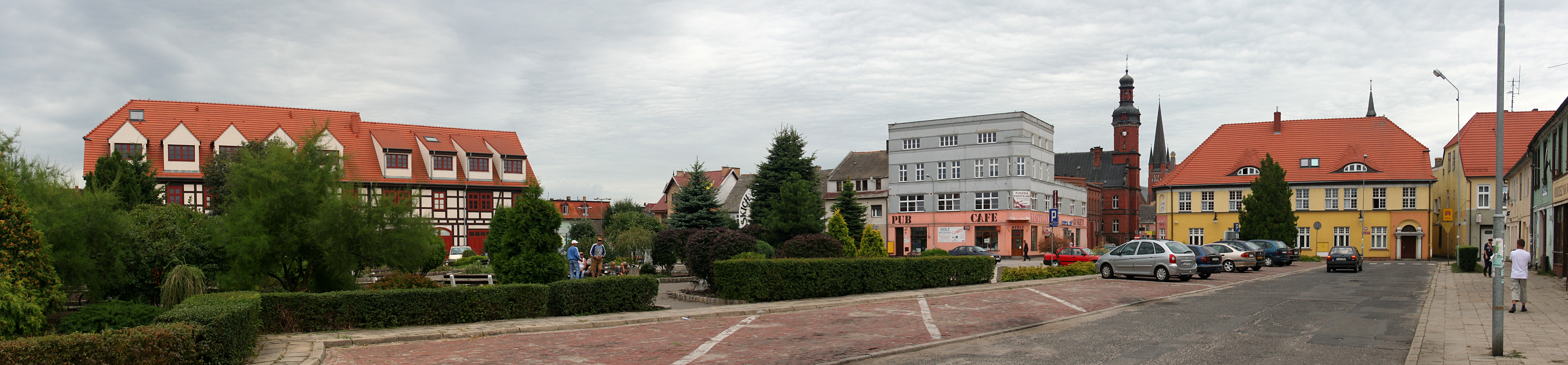 Drezdenko. Fragment układu urbanistycznego: Plac Wileński